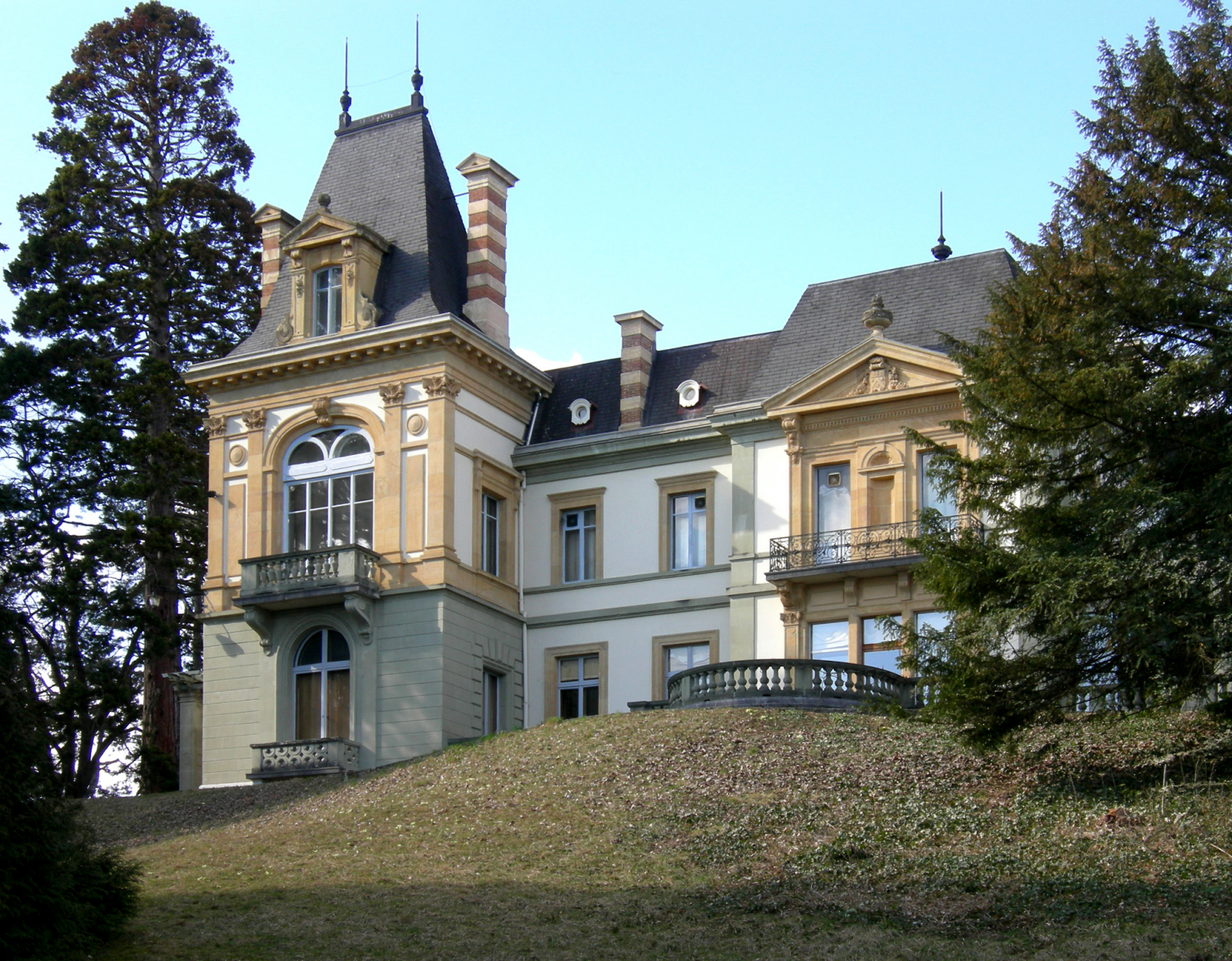 Neuchâtel, musée d'ethnographie